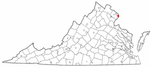 va maps